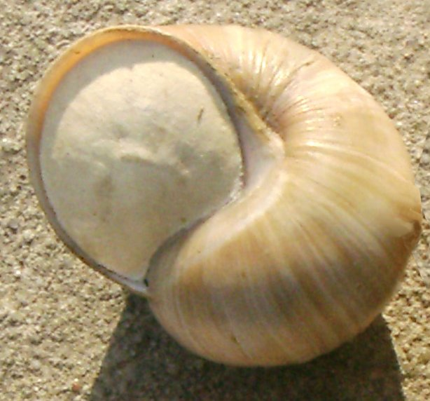 Helix lutescens zabezpieczony na zimę